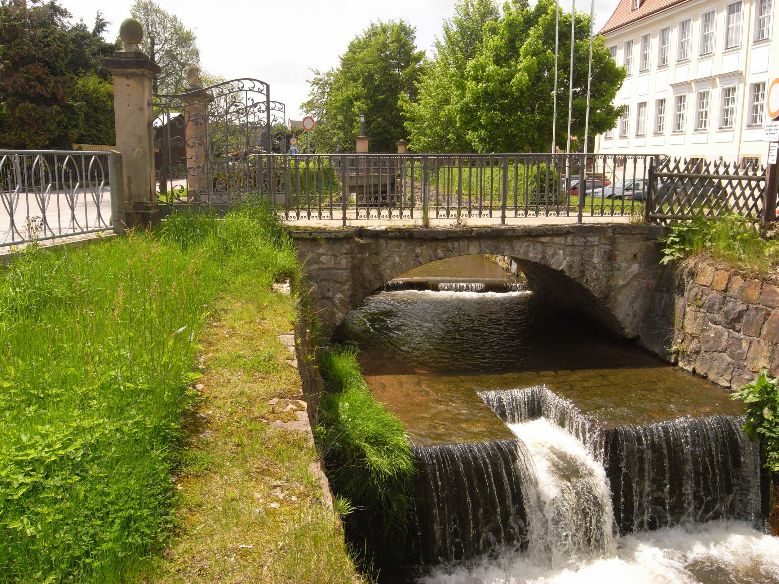 Lockwitzbach in Reinhardtsgrimma (Sachsen, Deutschland)